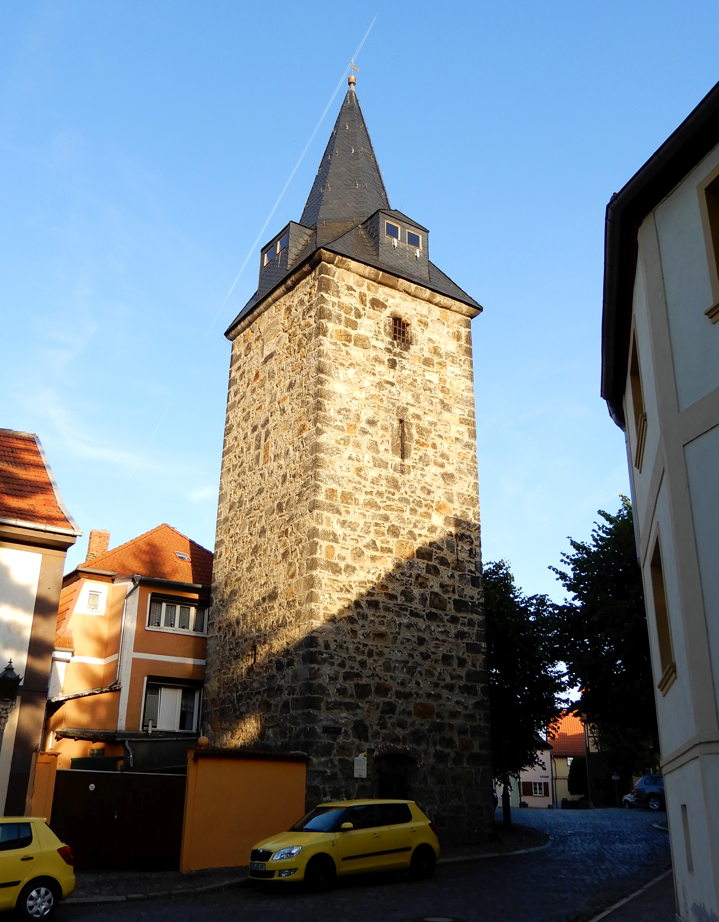 Marktturm Ballenstedt